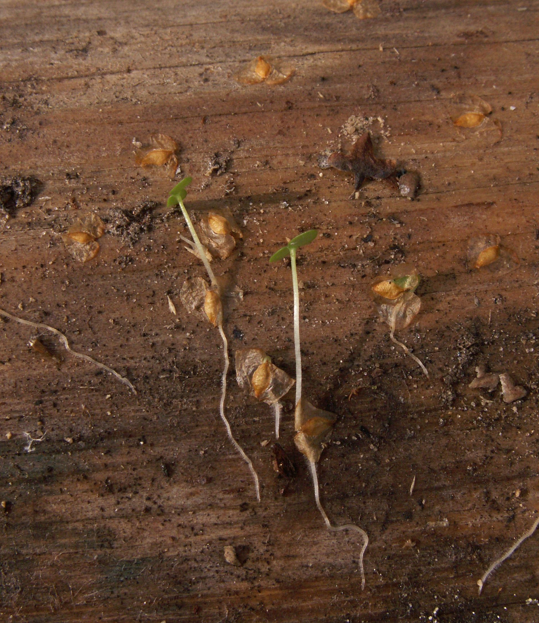 germ buds of Betula pendula